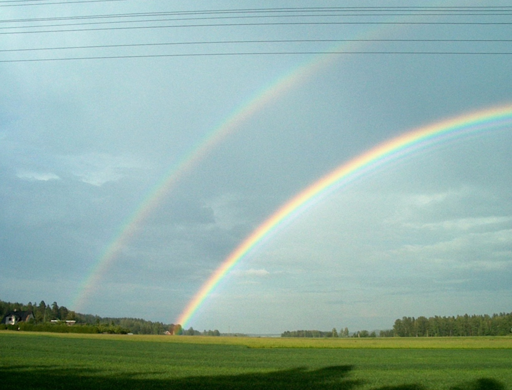 Kahekordne vikerkaar ja lisakaared põhivikerkaare sees.